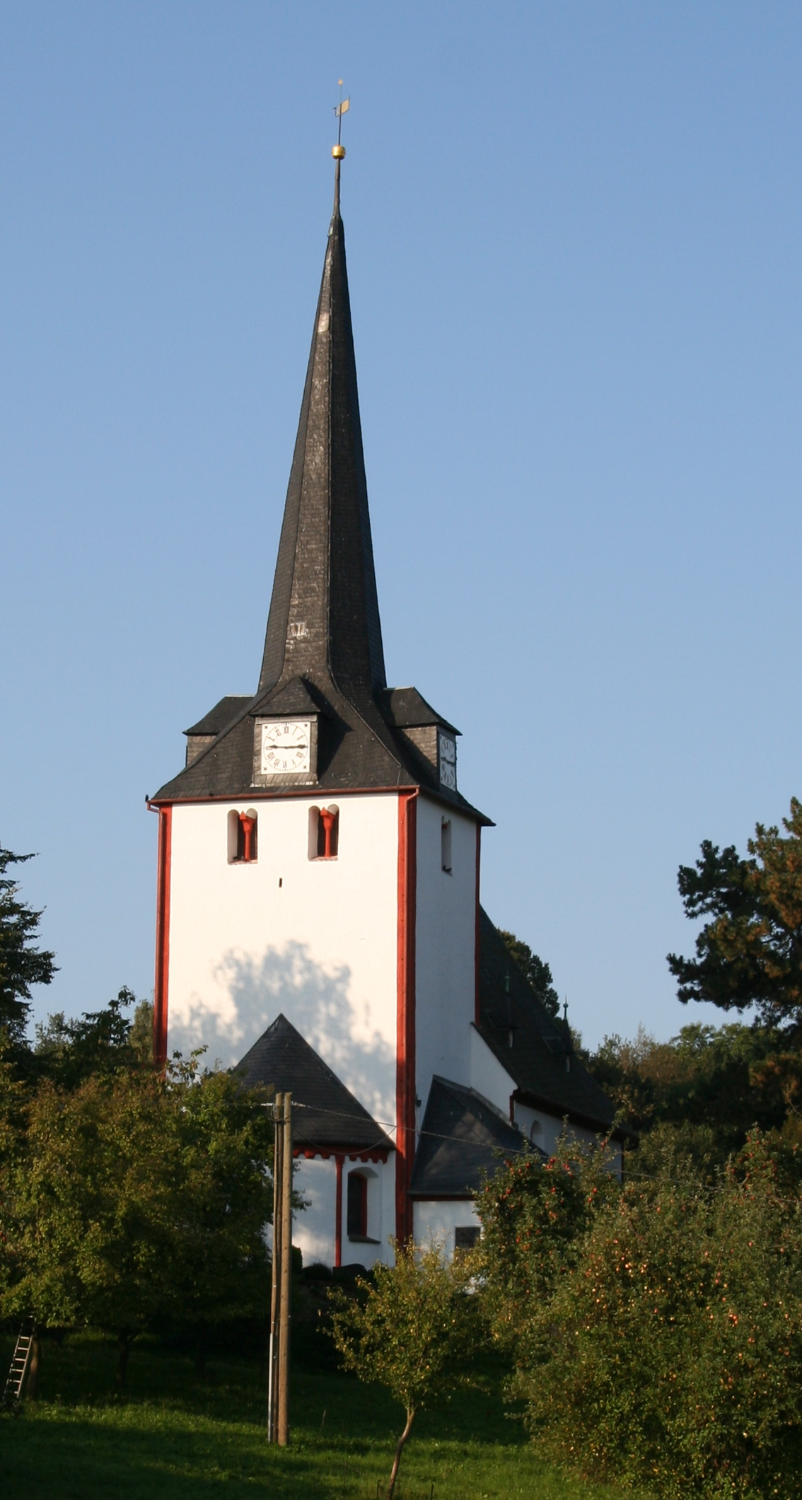 Kirche Niedersteinbach, ein Ortsteil von Penig